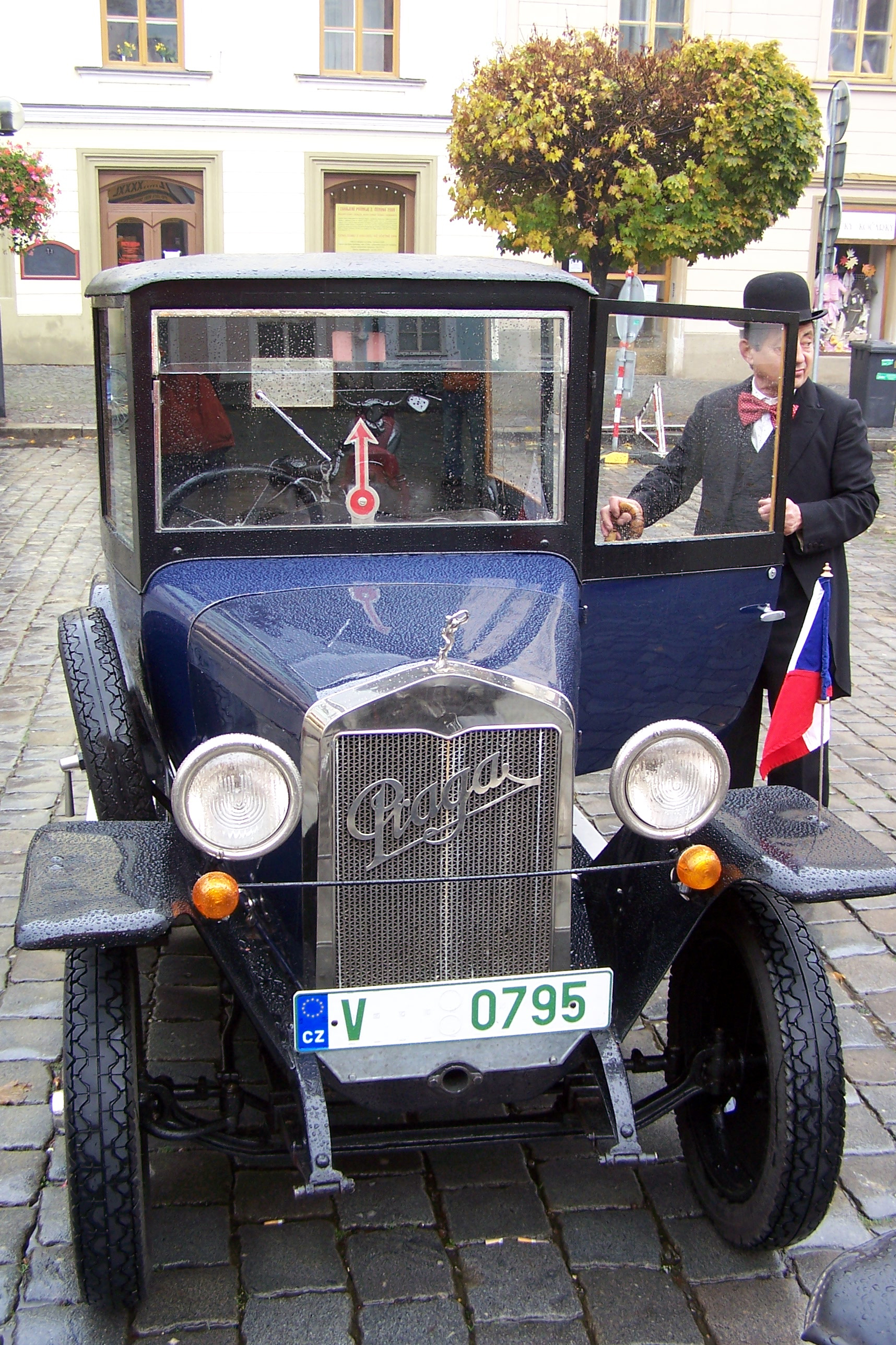 Praha Piccolo, Pardubice